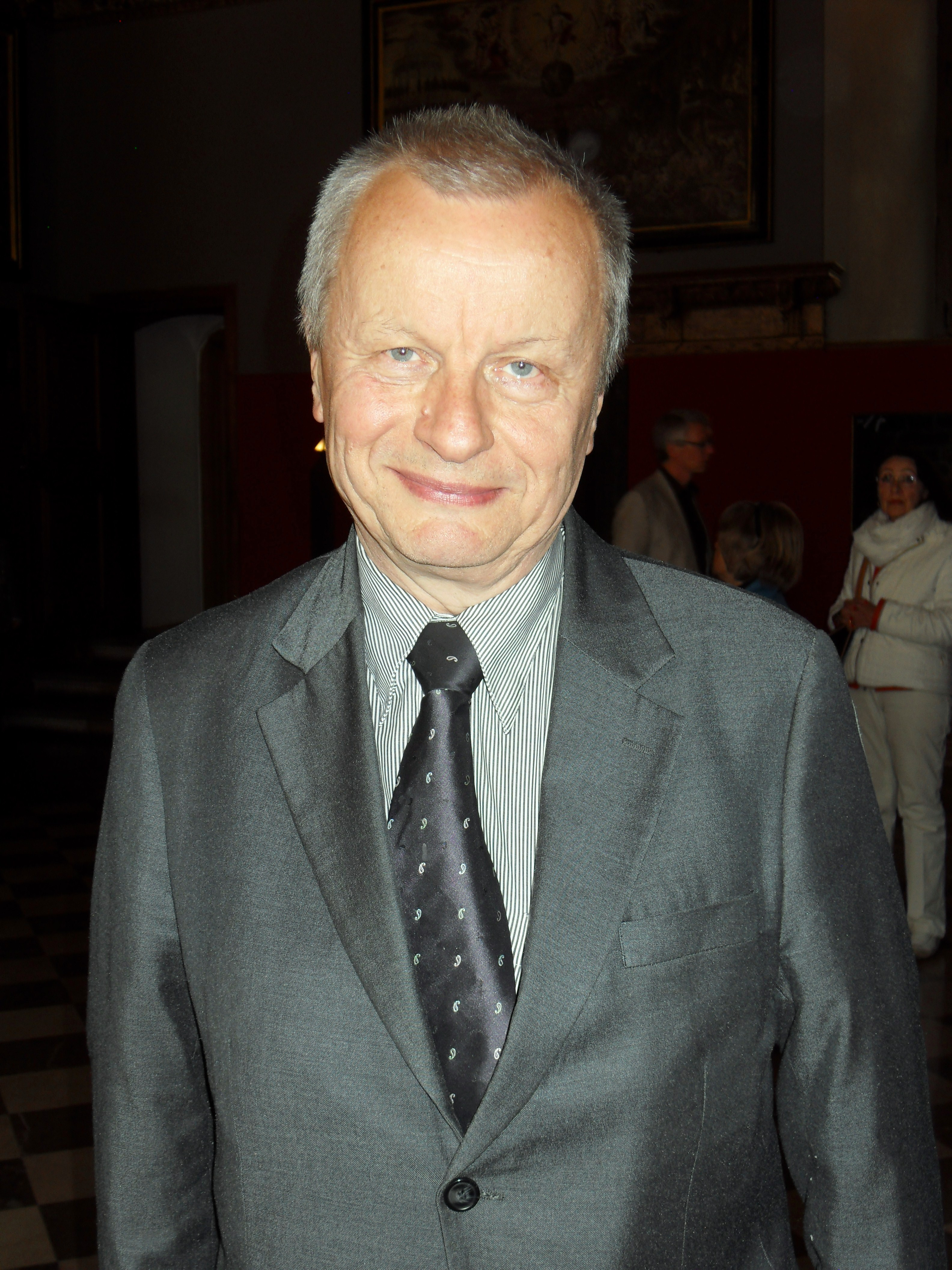 Jacek Starościak, prezydent Gdańska w latach 1990-1991.